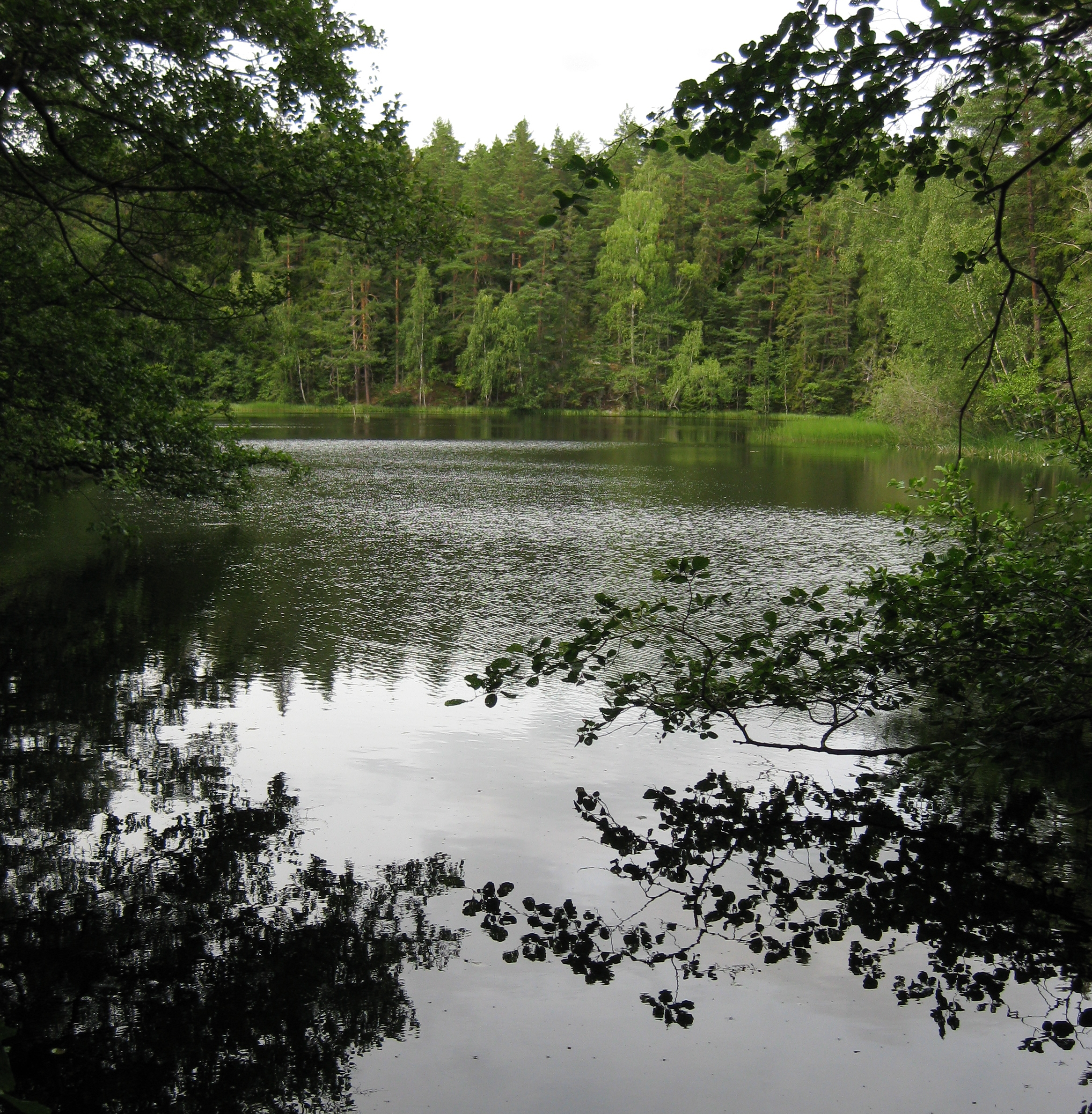 Jaktstusjön